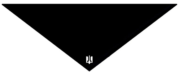 Хустка куреня ім. Михайла Поготовка